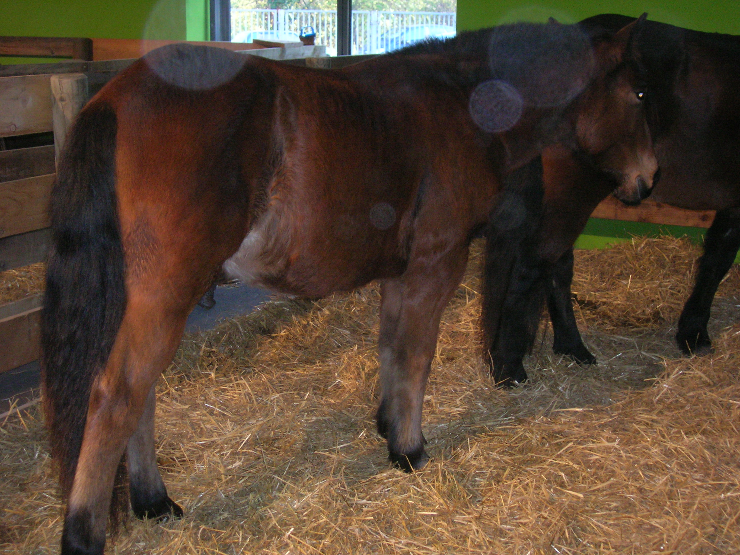 Cheval castillonnais au salon SISQA de Toulouse. (salon agro-alimentaire et agricole)